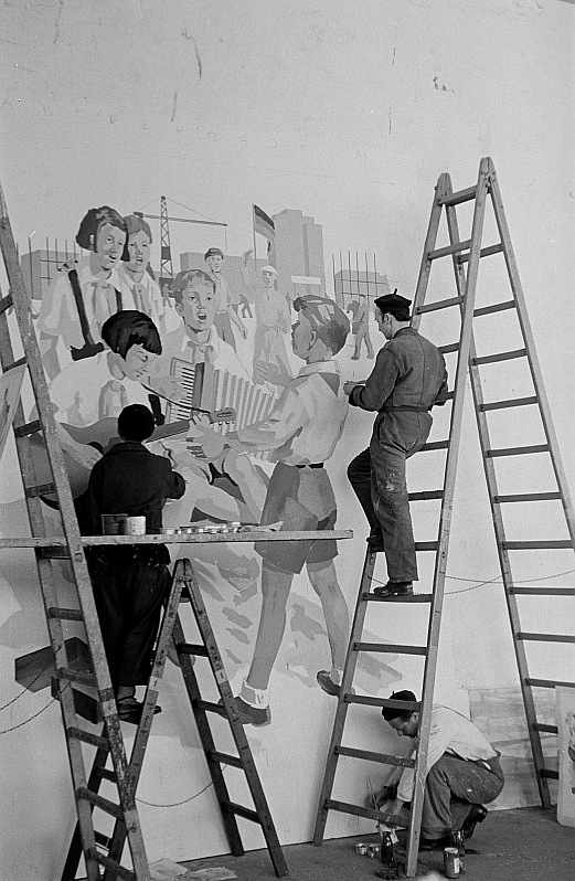 Original image description from the Deutsche FotothekFassadenmaler bei der Fertigung eines Wandbilds